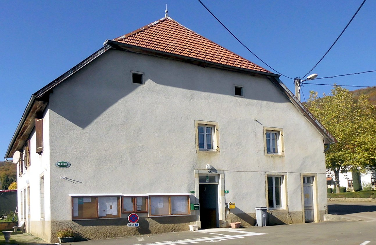 La mairie de Vellerot-lès-Belvoir